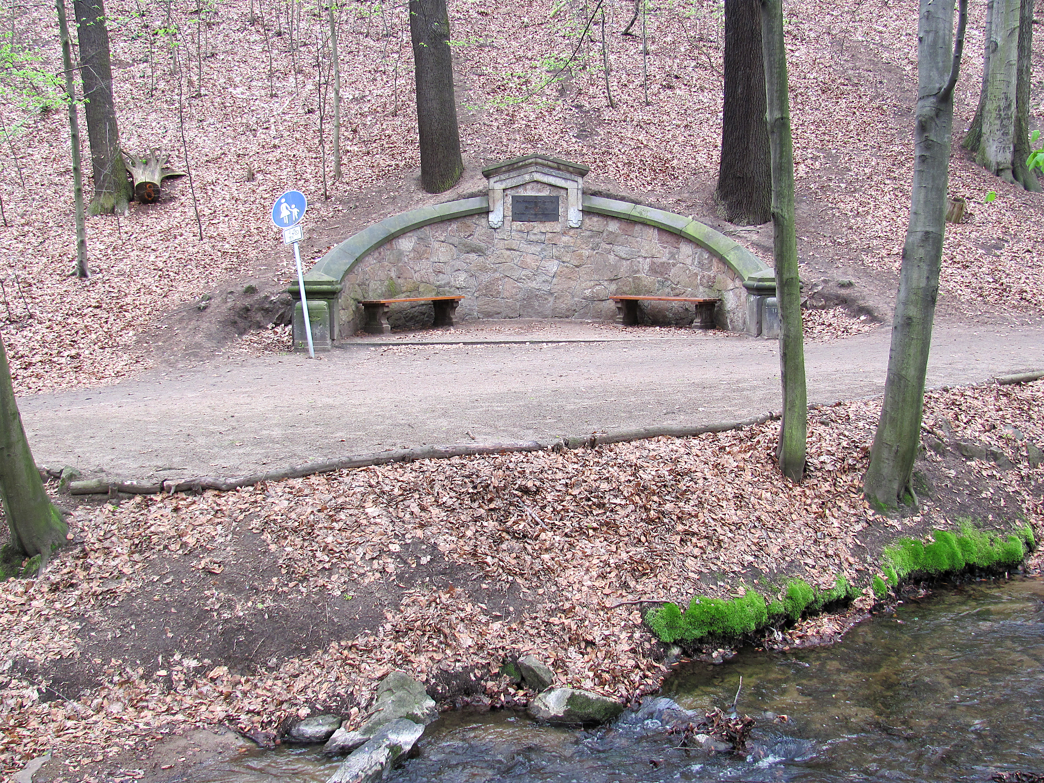 Radebeul, Moritz-Ziller-Denkmal